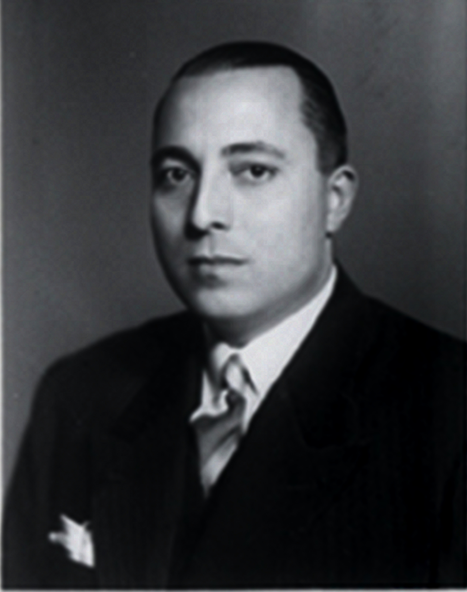 Ministro de Juan D. Perón, Ramón Cereijo.